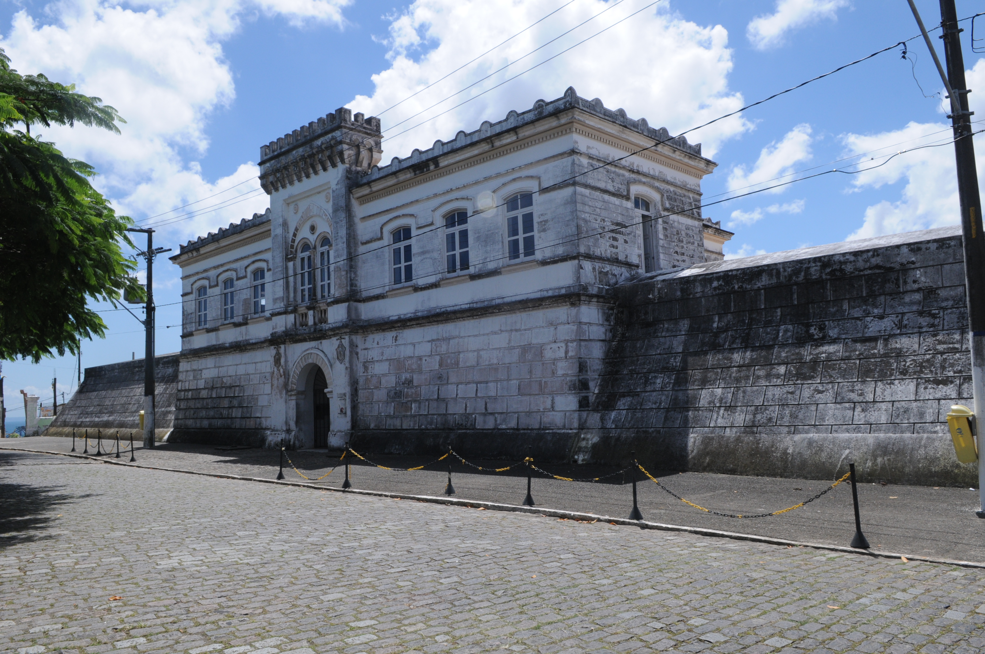 Forte do Santo Antonio